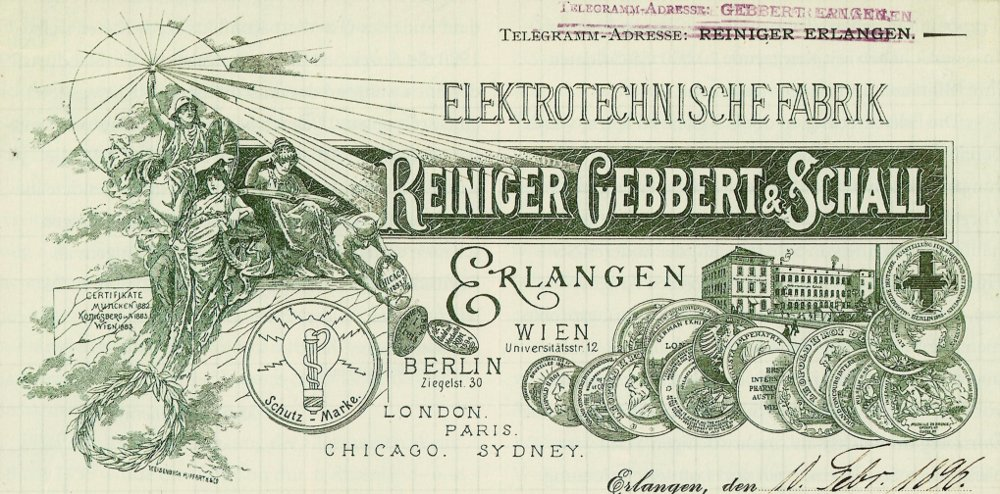 Briefkopf der Firma Reiniger, Gebbert & Schall in Erlangen